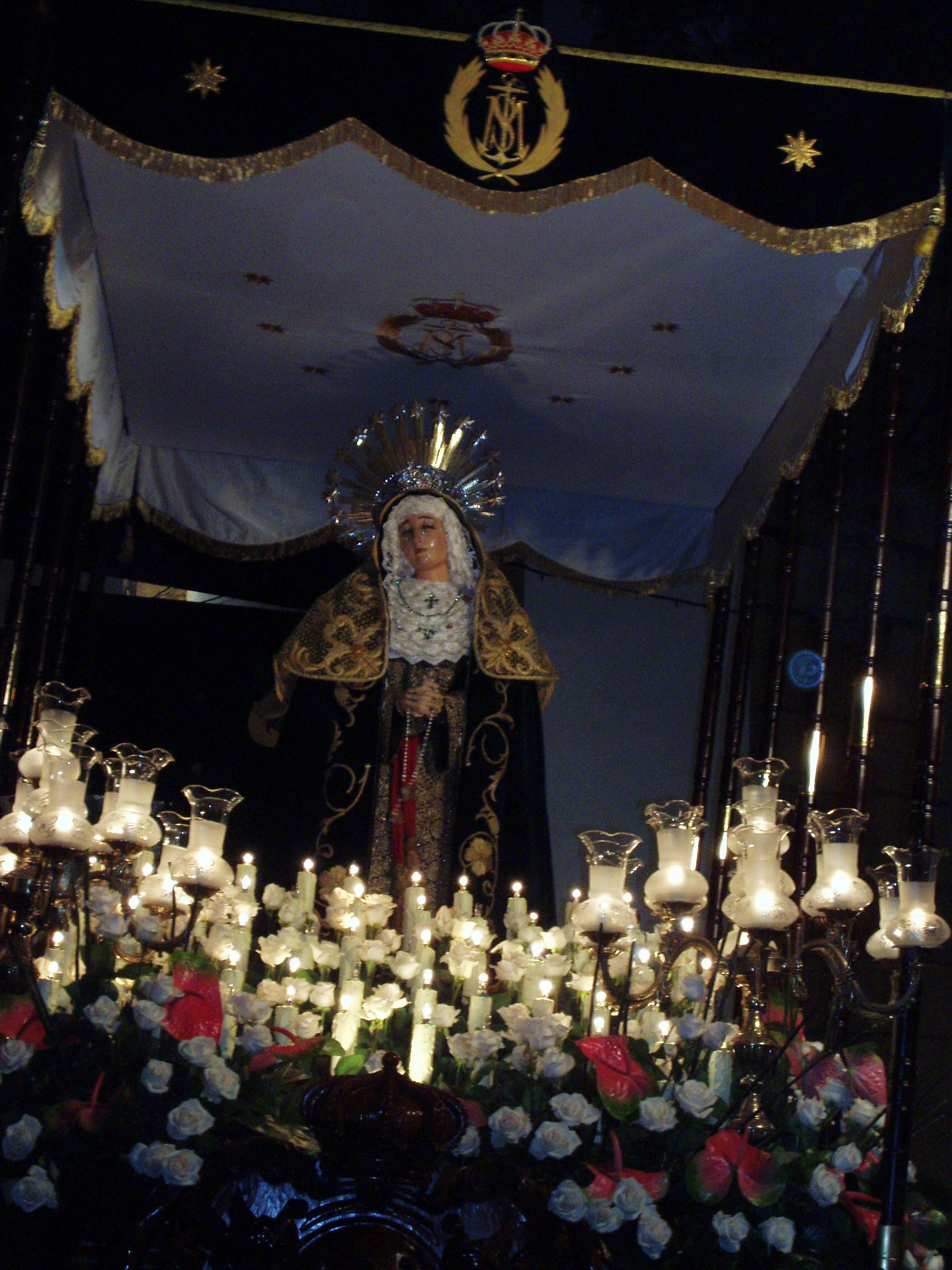 Semana Santa de 2.006. Retirada del paso de la Santísima Virgen de la Esperanza tras la procesión del Martes Santo.